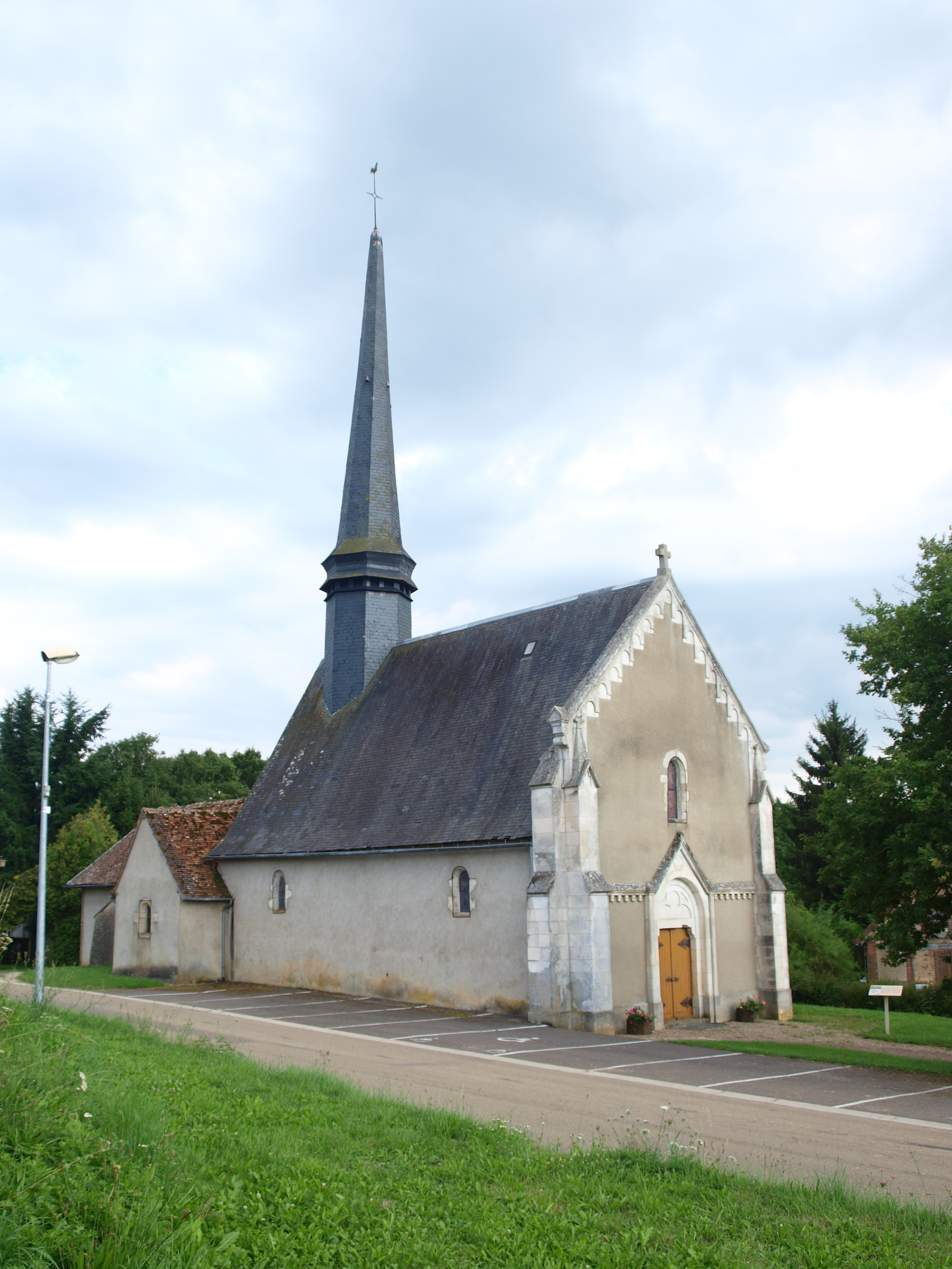 Église Saint-Fiacre de Ronchères (Yonne, France)